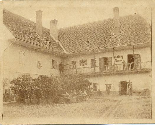 Grofovska gostilna na Cankovi okrog leta 1860. Tradicija gostinstva se nadaljuje tudi danes, saj v objektu deluje: Kavarna Vogler in Sobodajalstvo Obal.